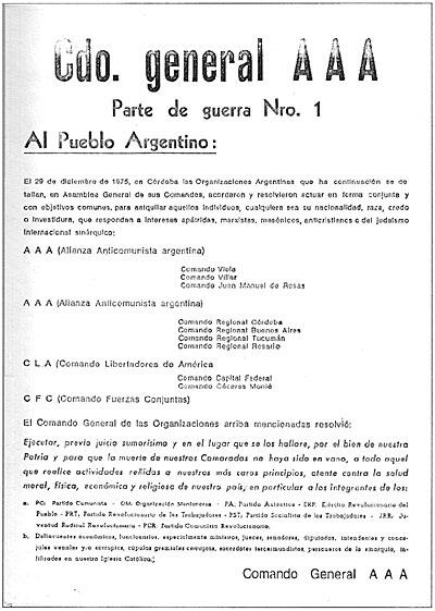 Primer comunicado de la Triple A